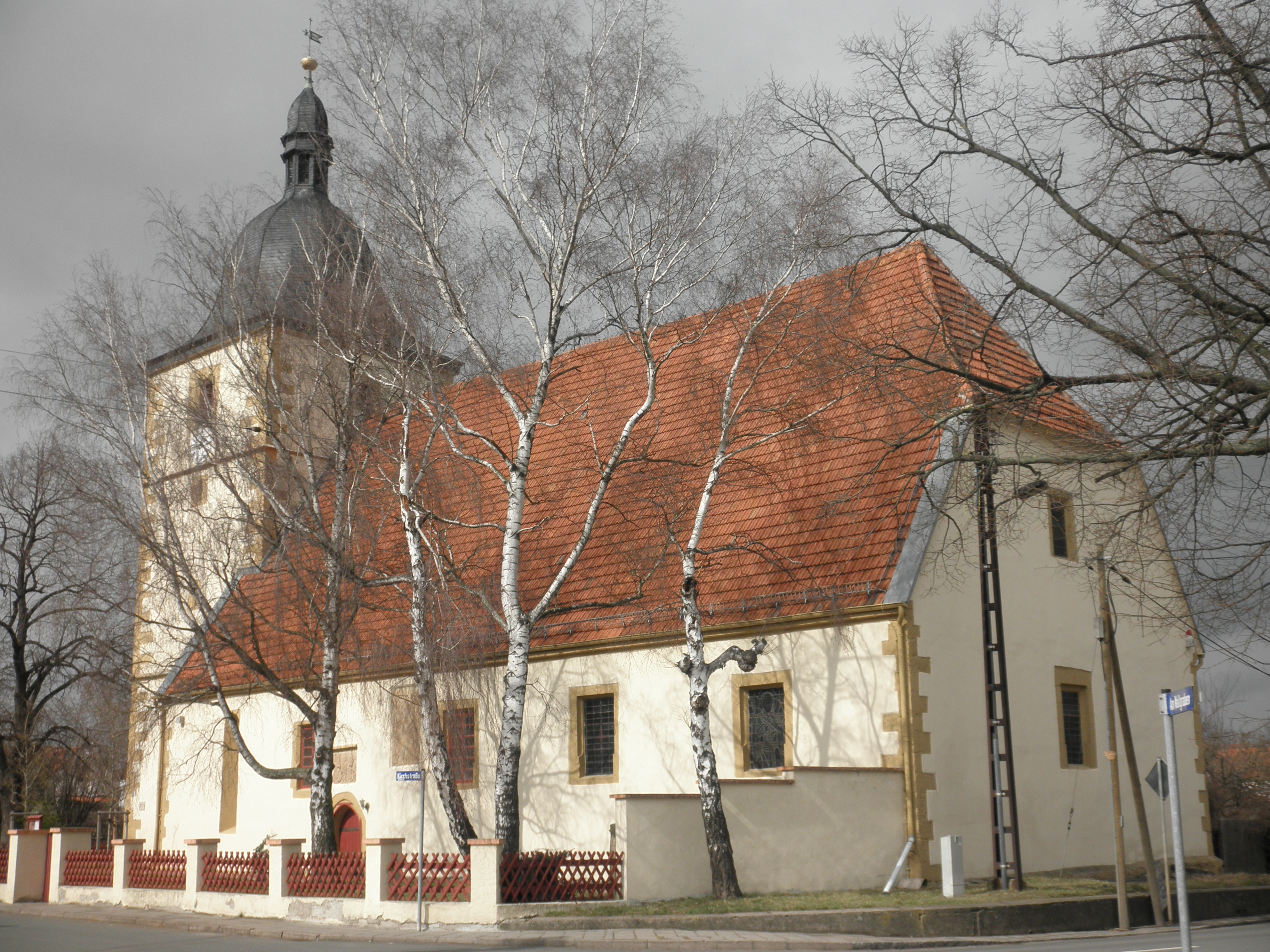 Kirche Döllstedt (von Osten)